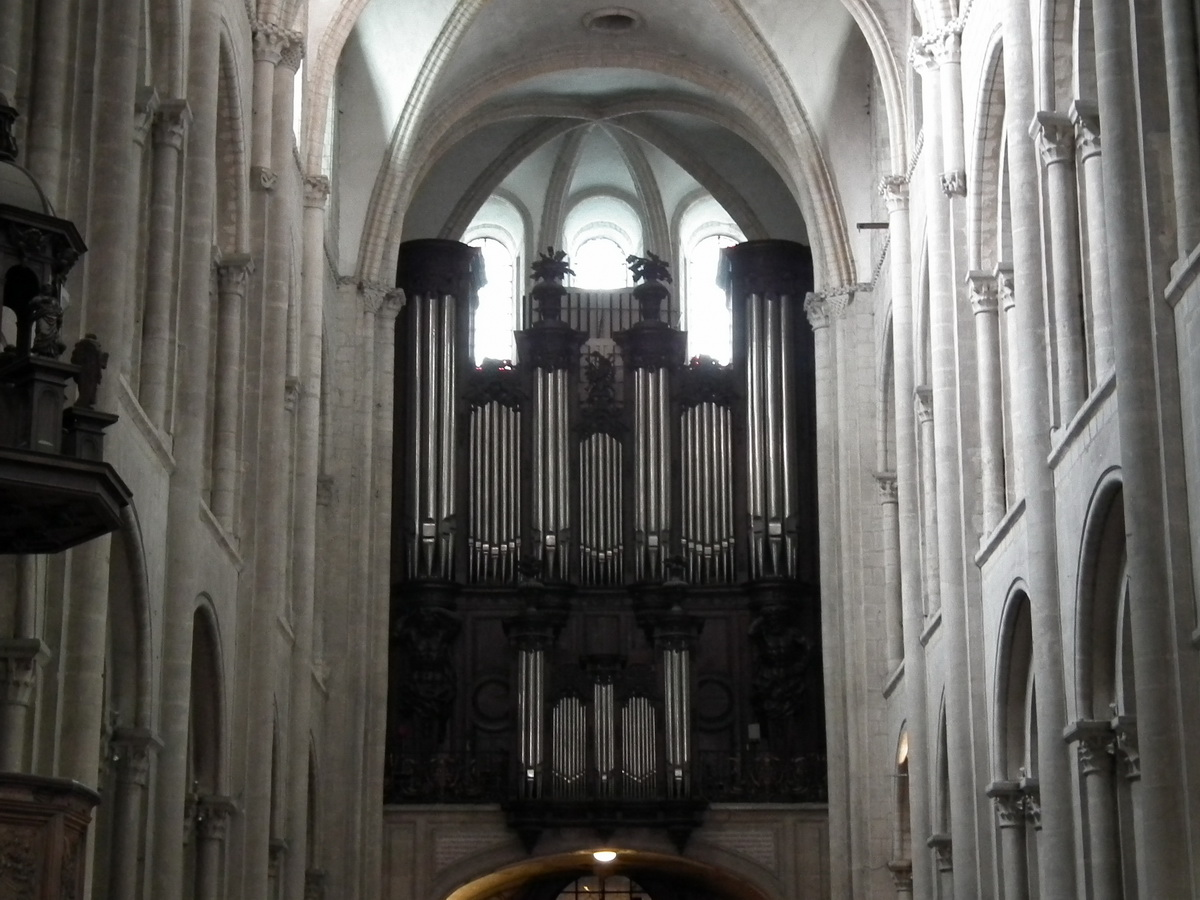 Abbaye aux Hommes, Caen, France. Buffet édifié en 1740 par François Poche pour l'orgue de Jean-Baptiste-Nicolas Lefèbvre terminé en 1745, classé Monument Historique au titre objet par la liste de 1840; contenant aujourd'hui un orgue d'Aristide Cavaillé-Coll de 1885 restauré par Jacquot-Lavergne.